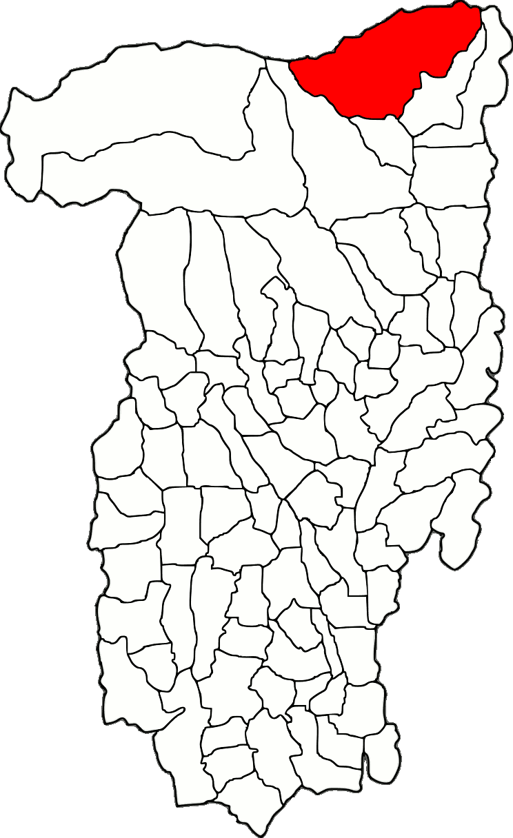 Lage der Gemeinde Câineni im Kreis Vâlcea (RO).